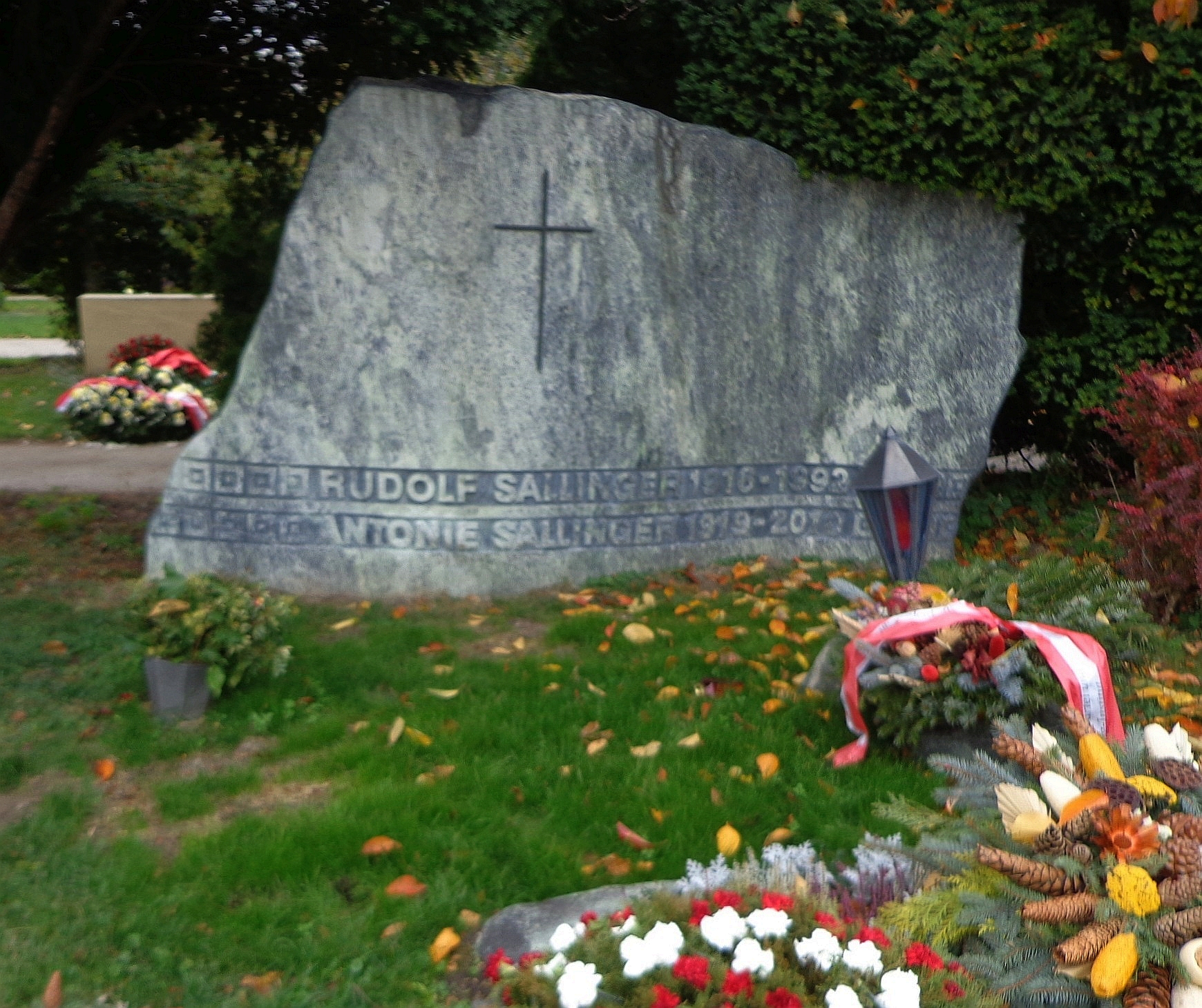 Wiener Zentralfriedhof - Gruppe 32 C, Ehrengrab von Rudolf Sallinger